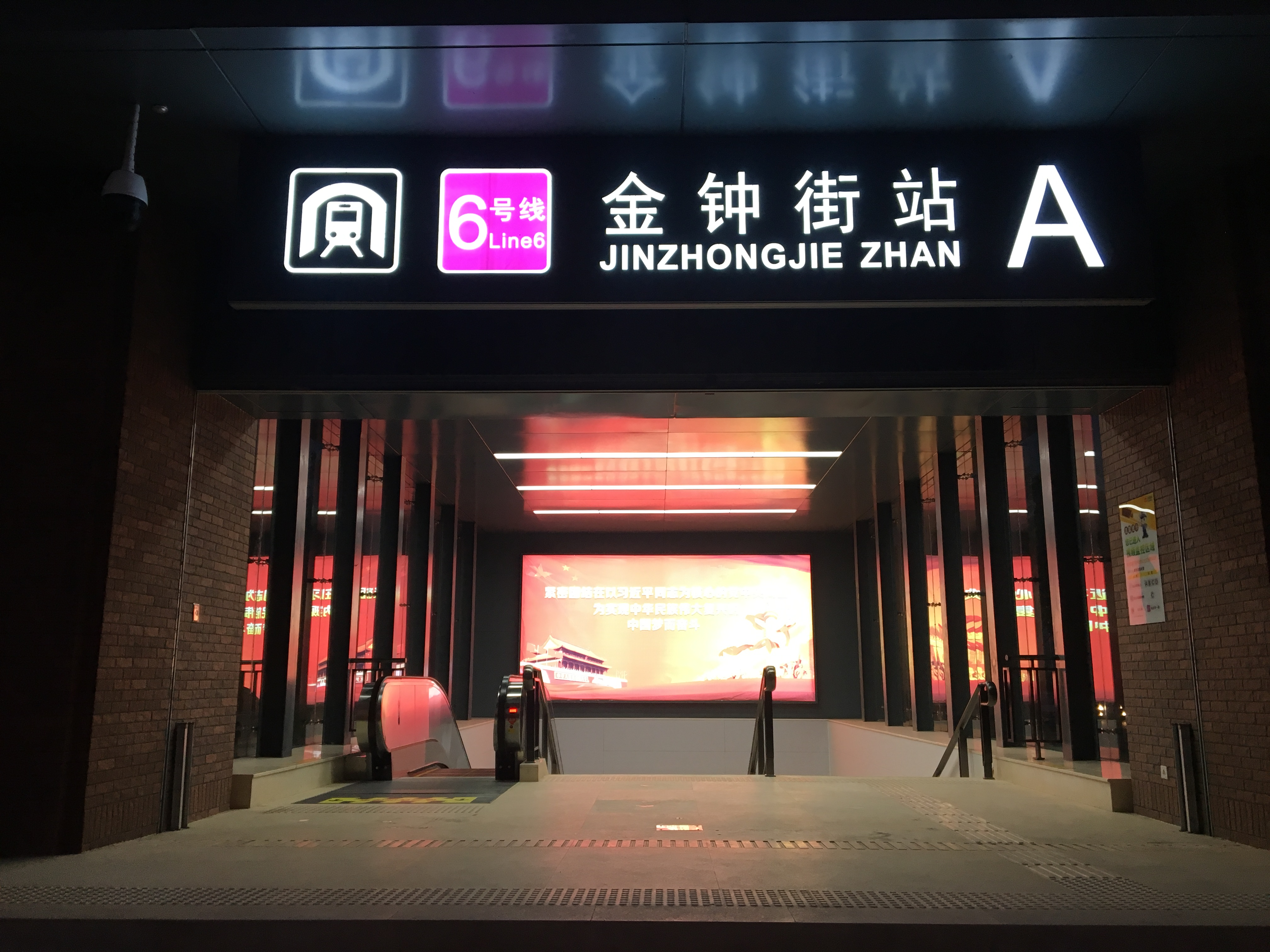 天津地铁6号线金钟街站A口，2018年11月1日启用